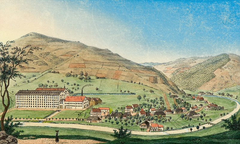 «Donaueschingen». Gouache. Unsigniert, auf Passepartout bezeichnet. 24 x 38 cm